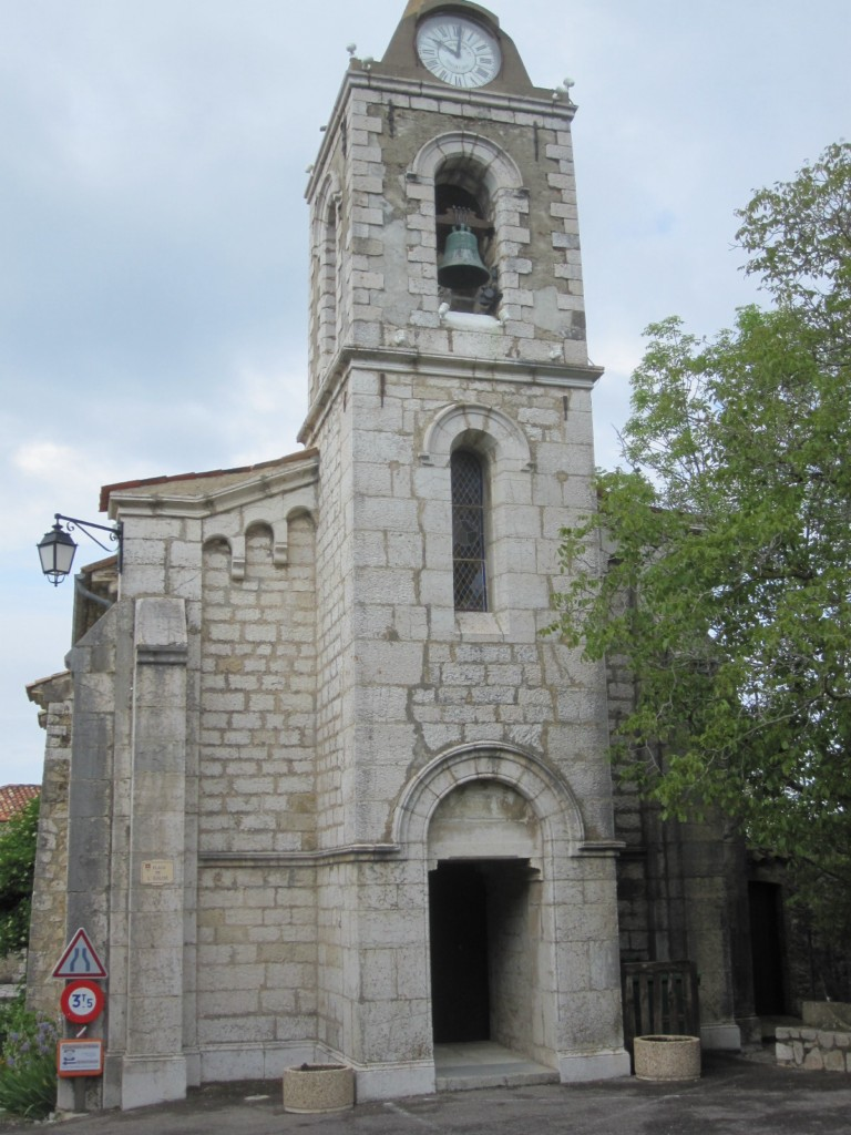 Église de La Bastide (Var) France